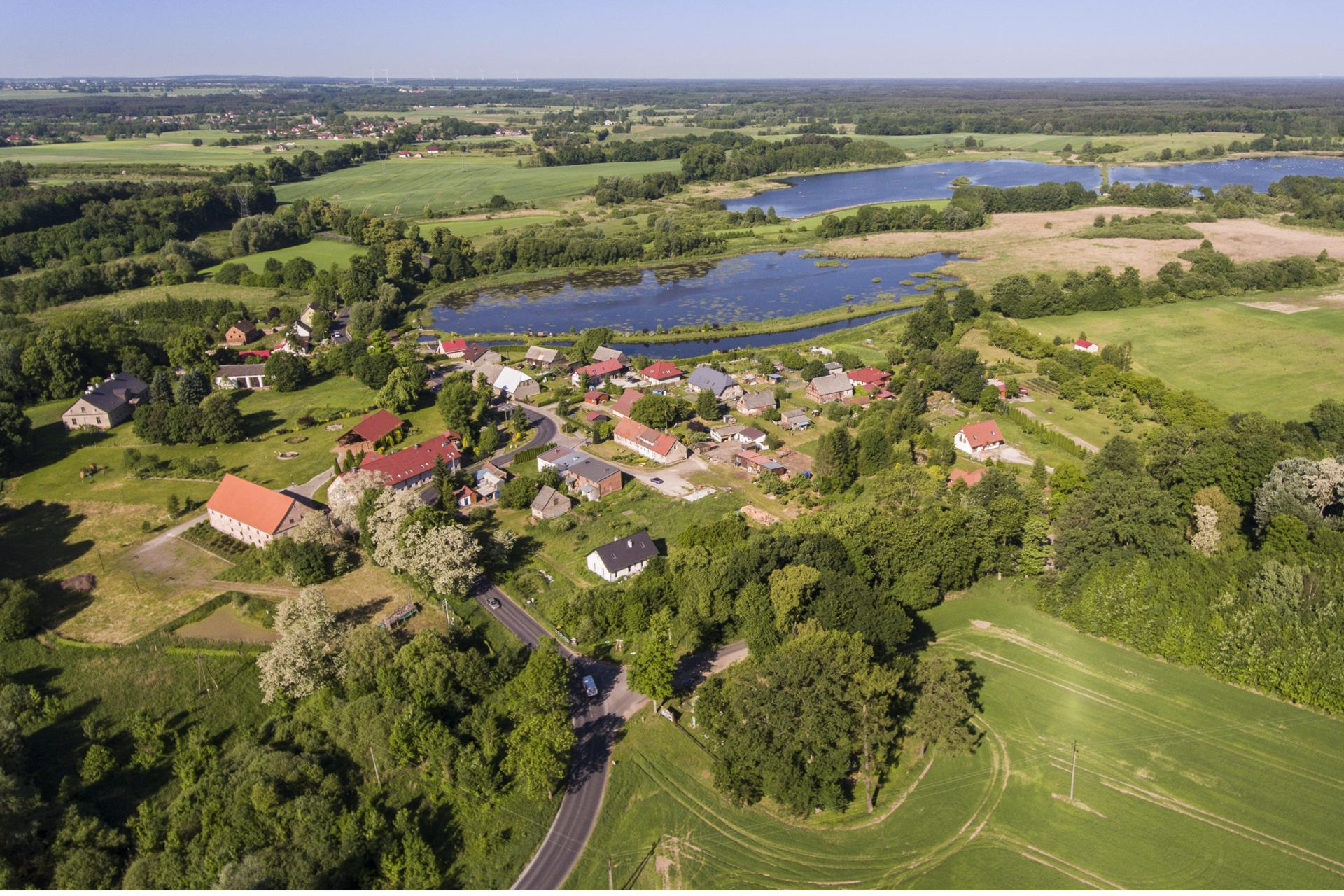 Mironice z lotu ptaka